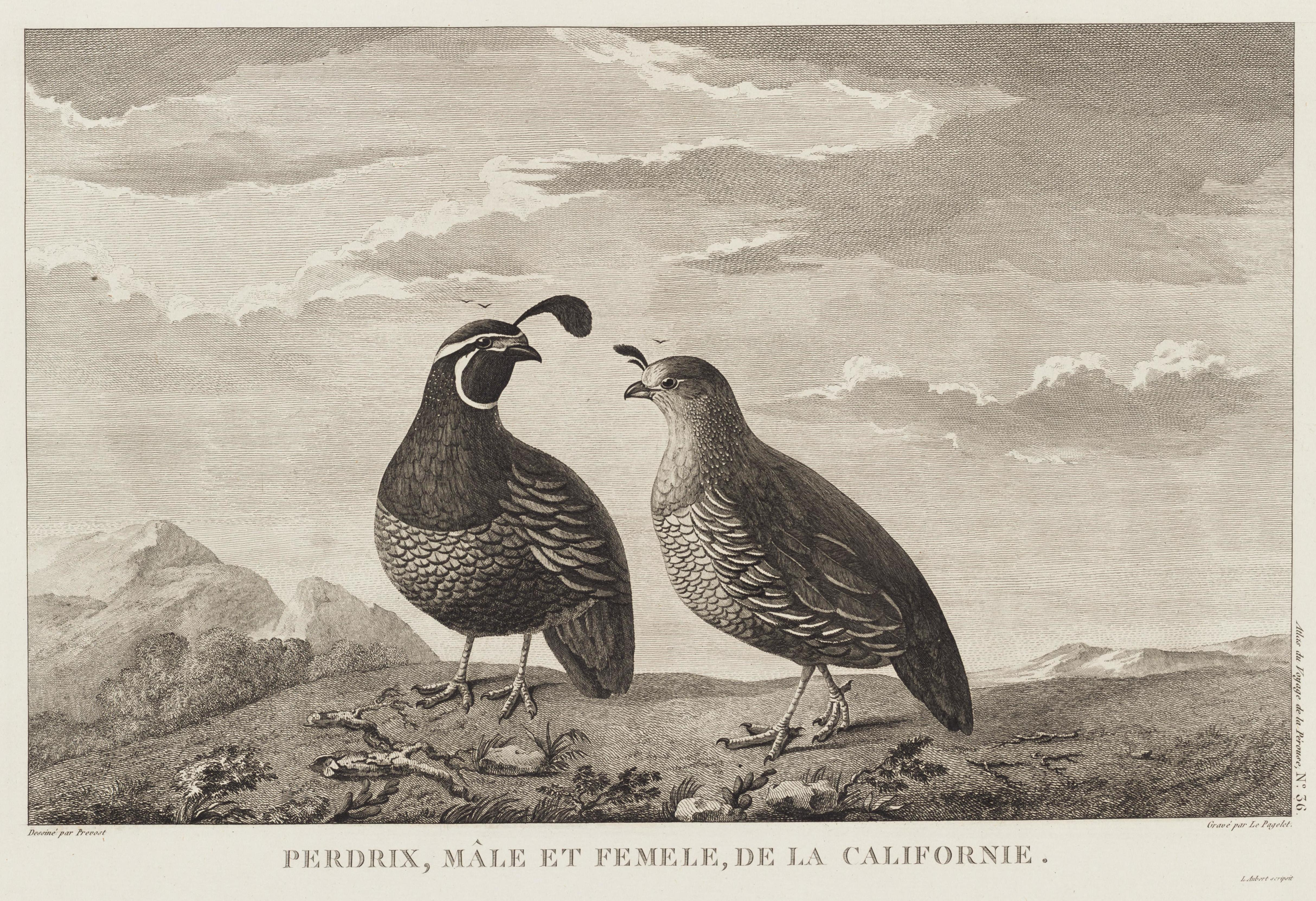 Voyage de La Pérouse autour du monde /publié conformément au décret du 22 avril 1791, et rédigé par L.A. Milet-Mureau.